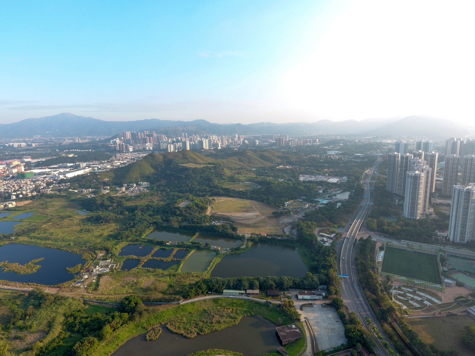 Ah Kai Shan